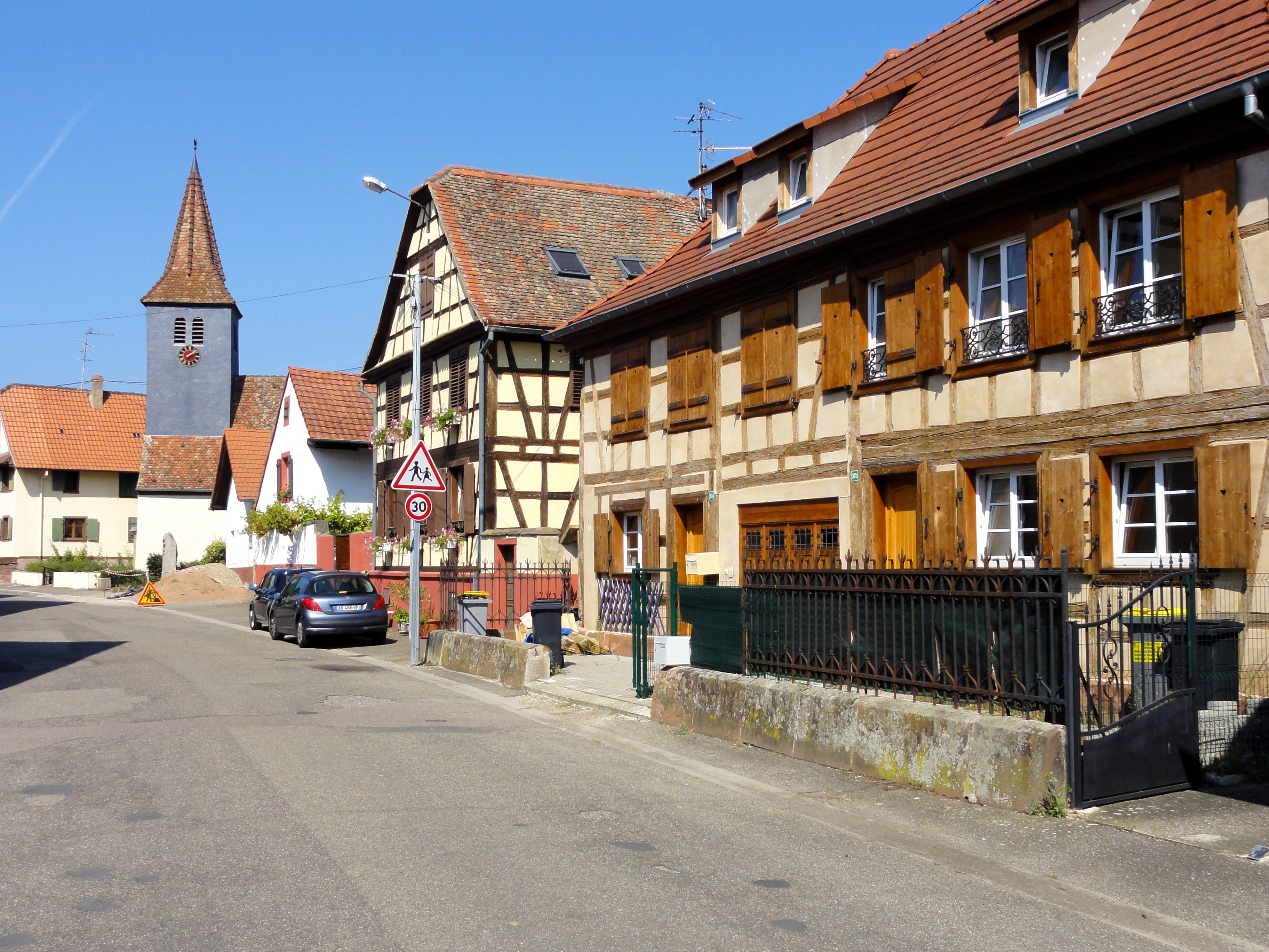 Alsace, Bas-Rhin, Quatzenheim, Rue des Seigneurs, Ancienne synagogue à droite au n°37. .